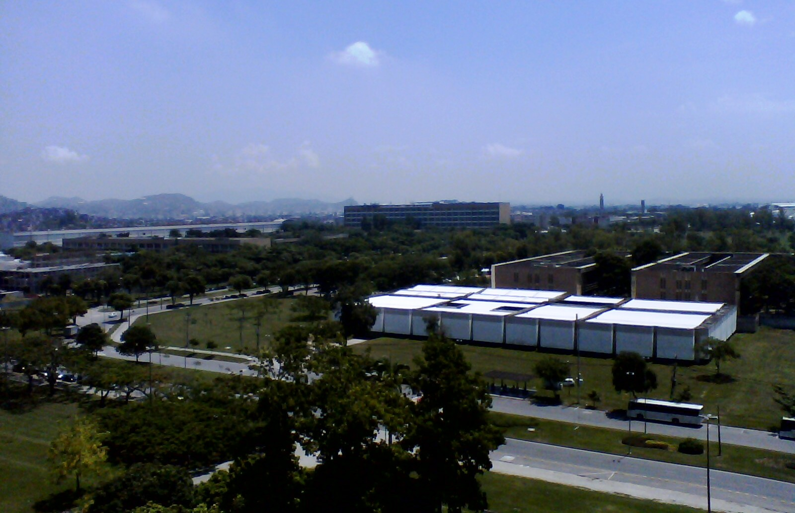 Cidade Universitária da Universidade Federal do Rio de Janeiro no Rio de Janeiro, Brasil.